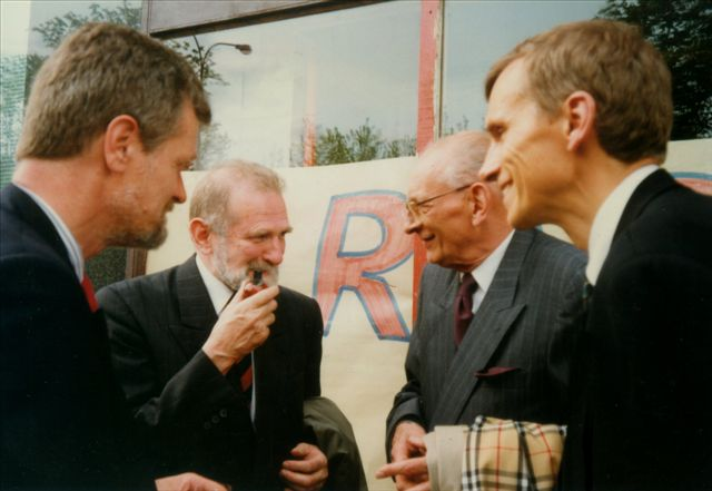 Piotr Nowina-Konopka (b. 1948), Polish politician, Bronisław Geremek (1932-2008), Polish historian and politician, Władysław Bartoszewski (1922-2015), Polish historian and politician, and Marcin Święcicki (b. 1947), Polish politician